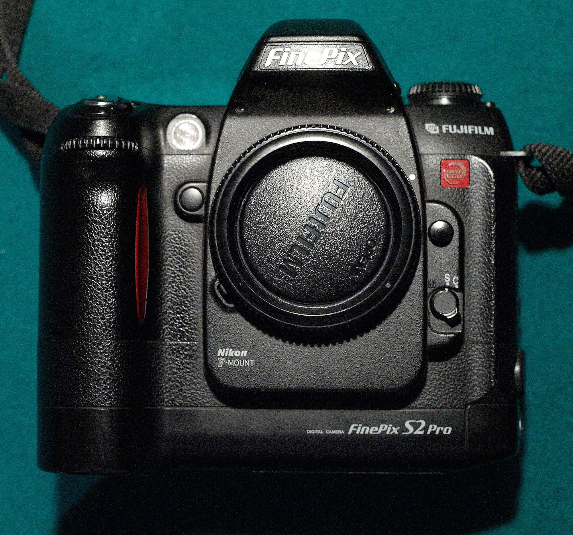 finepix s2pro